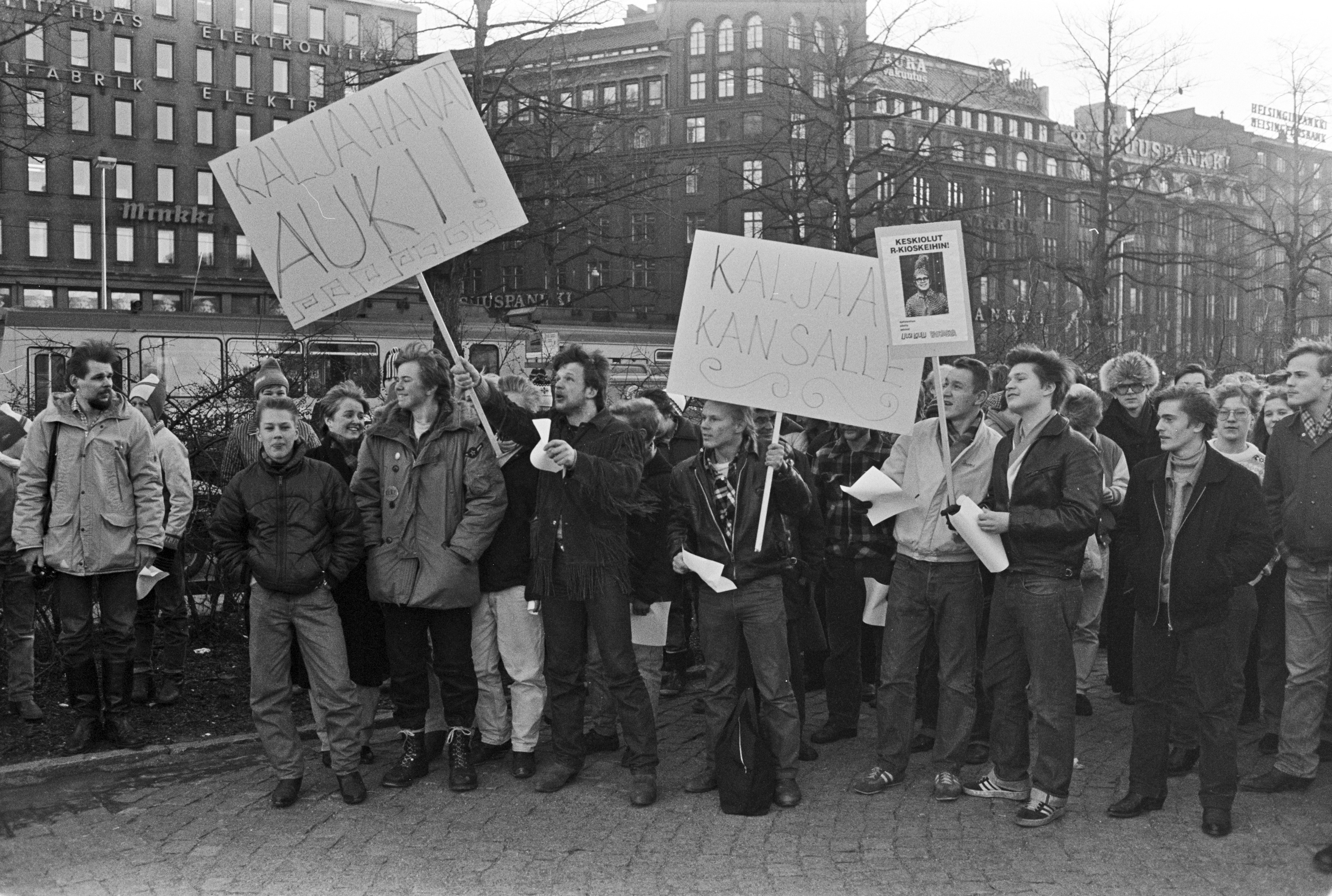 Keskiolut R-kioskeihin -kansanliikkeen kokoontuminen Rautatientorilla. Mielenosoittajia ja kylttejä, joissa tekstit: Kaljahanat auki!, Kaljaa kansalle ja Keskiolut R-kioskeihin!